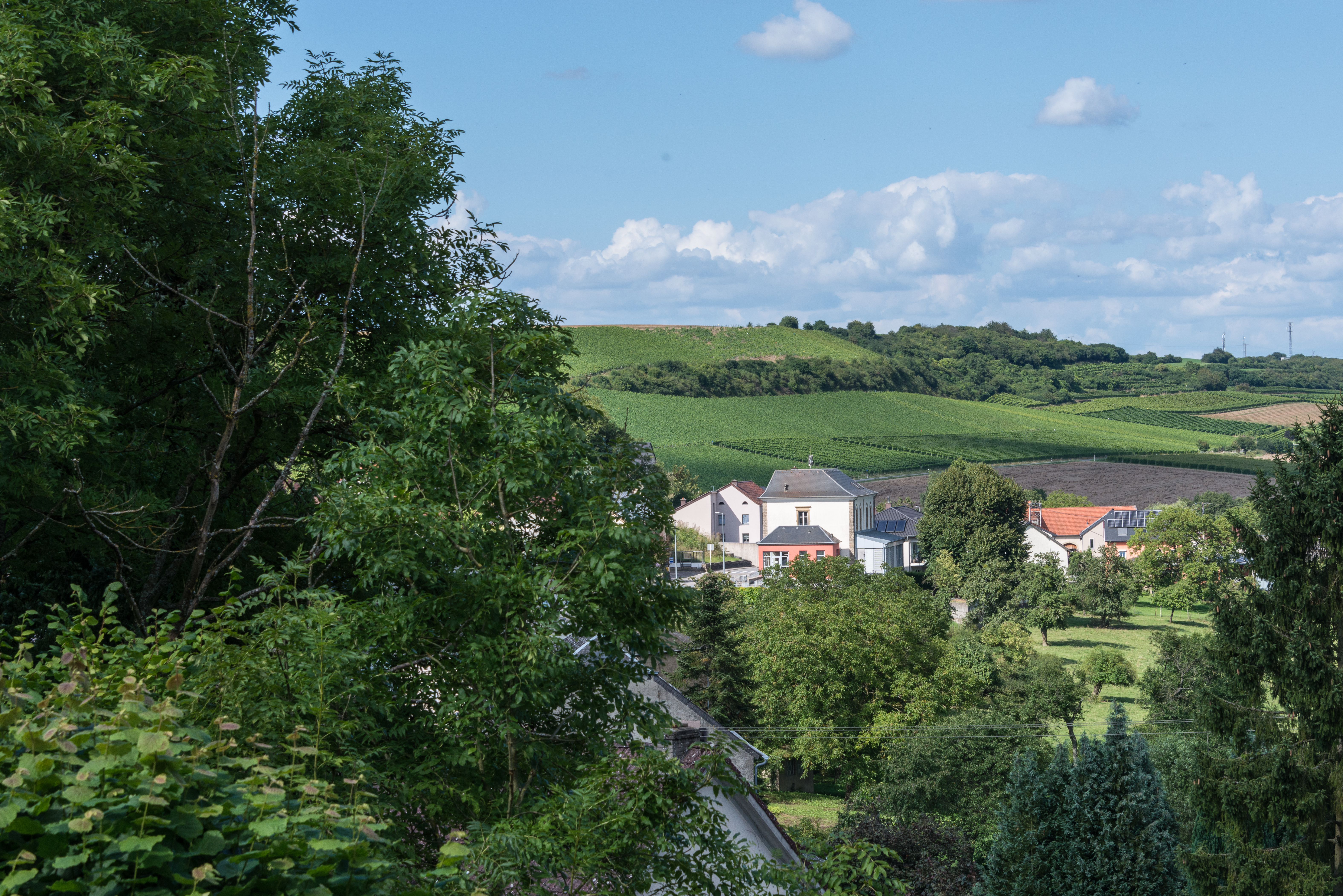 Vue vun der Kierch op Nidderdonwen .